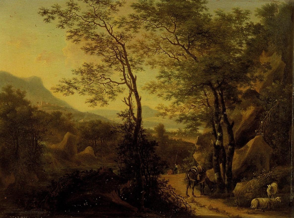 Pendant of File:Willem de Heusch 002.jpg